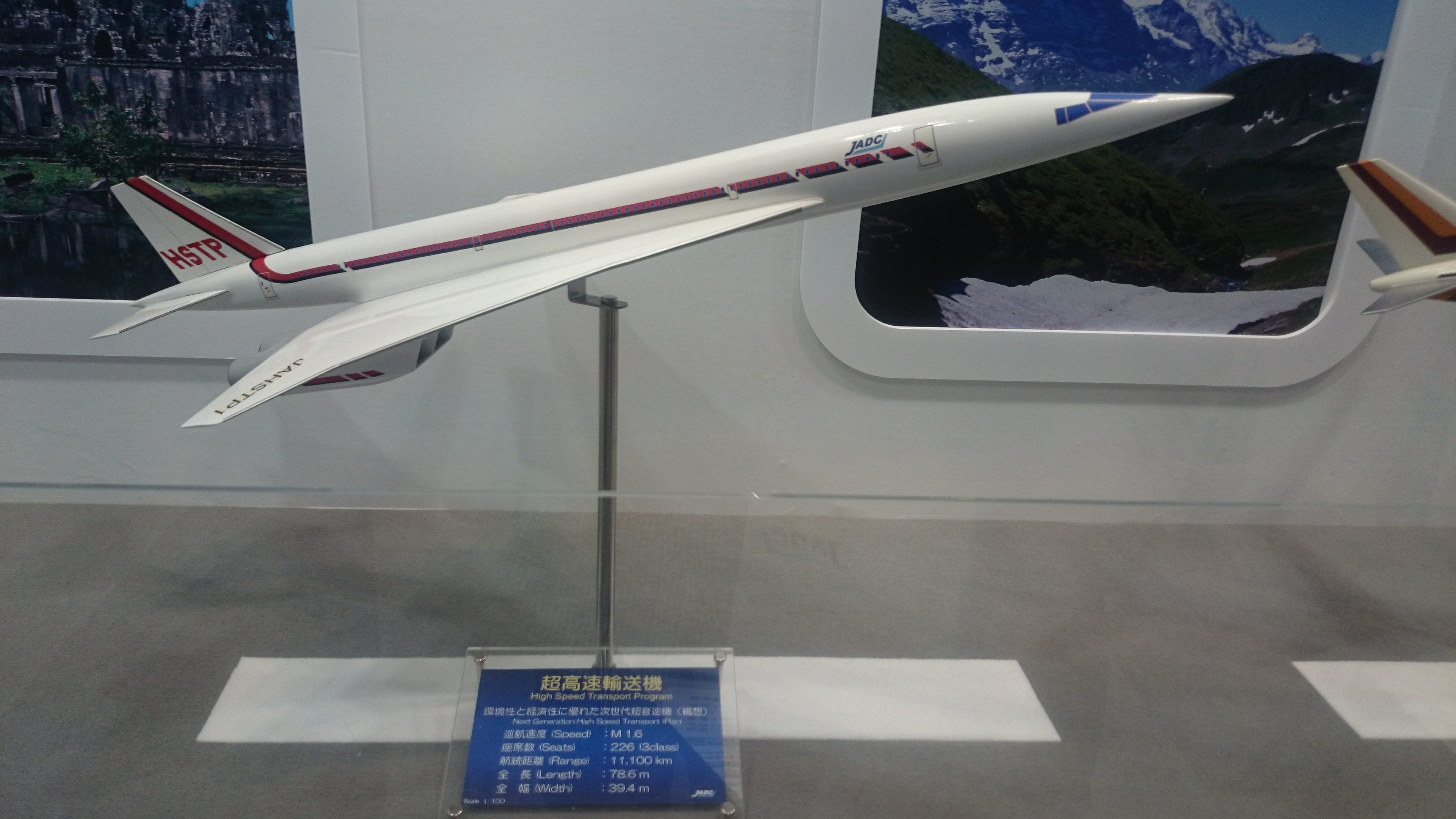 超音速輸送機 国際航空宇宙展